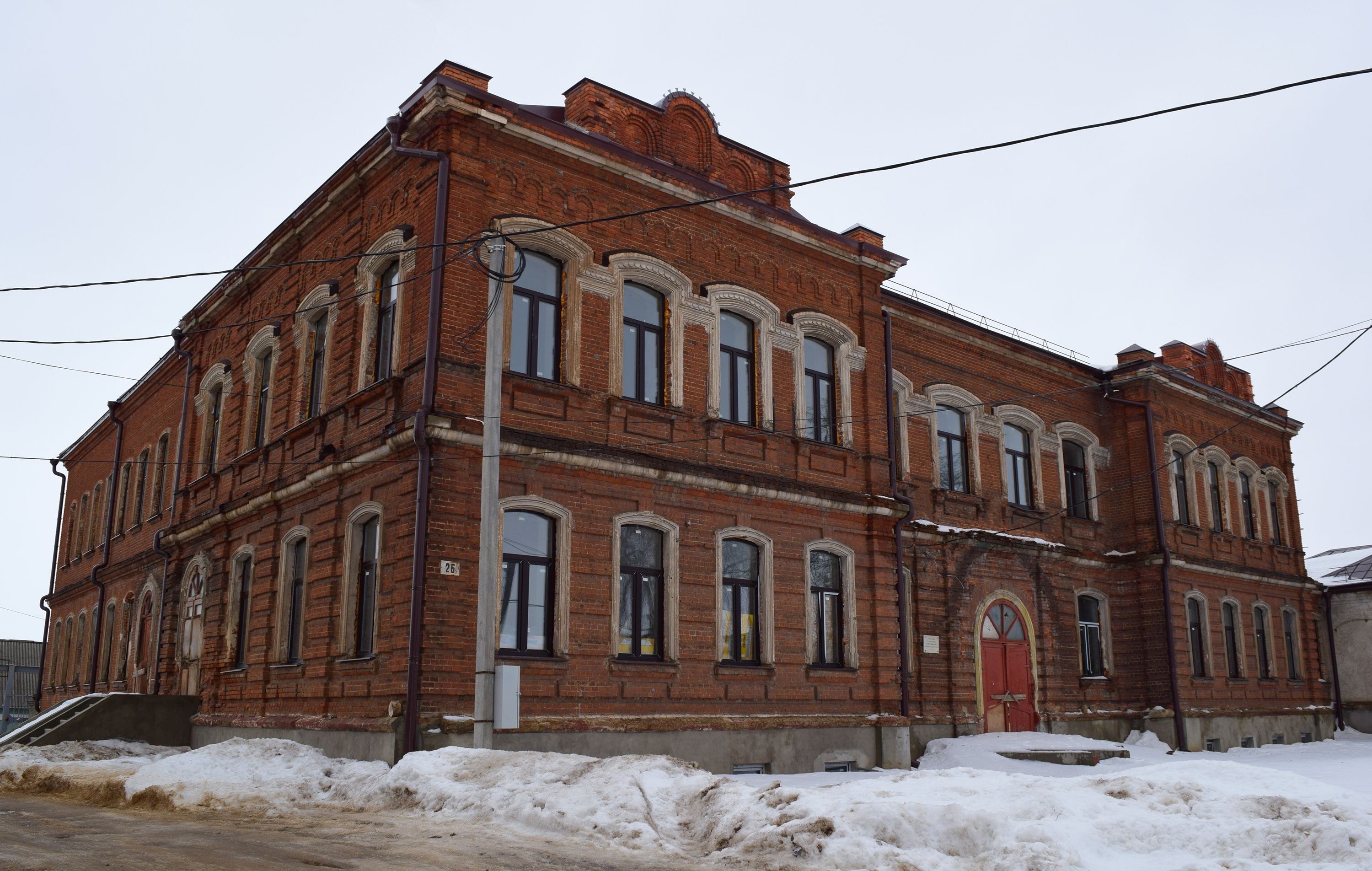 г.Скопин, ул.Октябрьская, д.26. Памятник архитектуры XIX века. В разные годы, помимо духовного училища, здесь располагались педагогическое училище, горный техникум, медицинское училище, епархиальное управление и др.